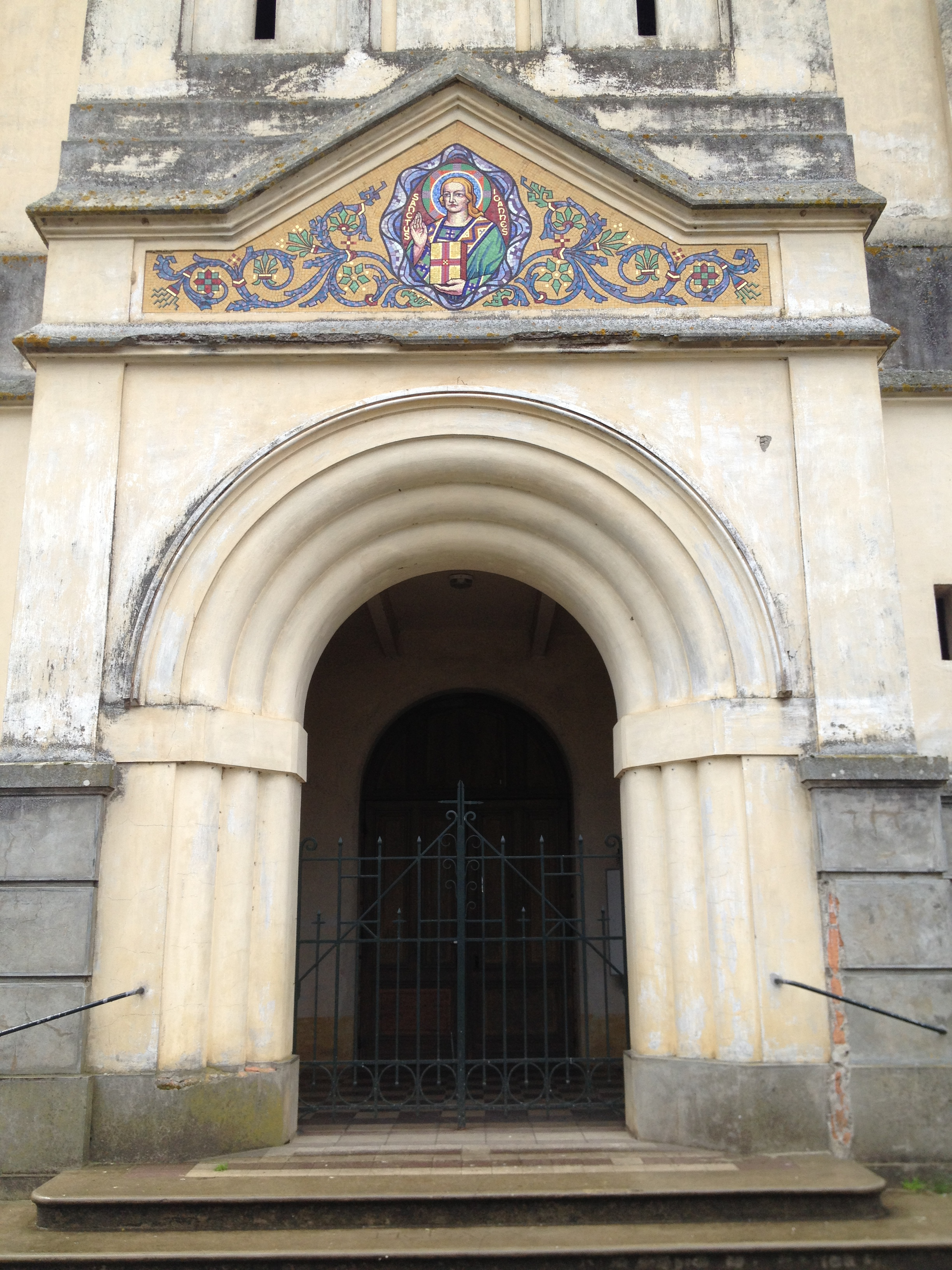 Porte de l'église de Brocas.